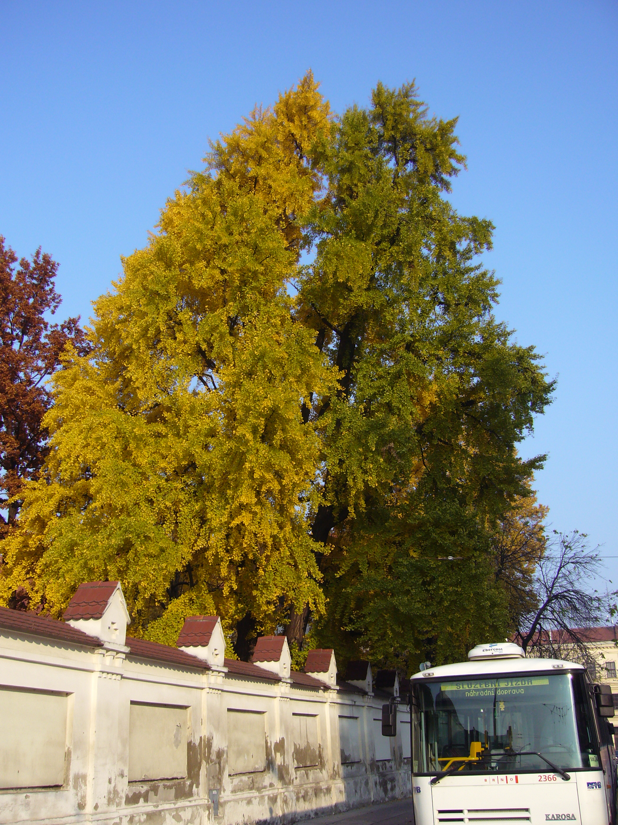 Pohled z Mendlova nám. U chodníku kolem zdi trvale parkují městské autobusy.